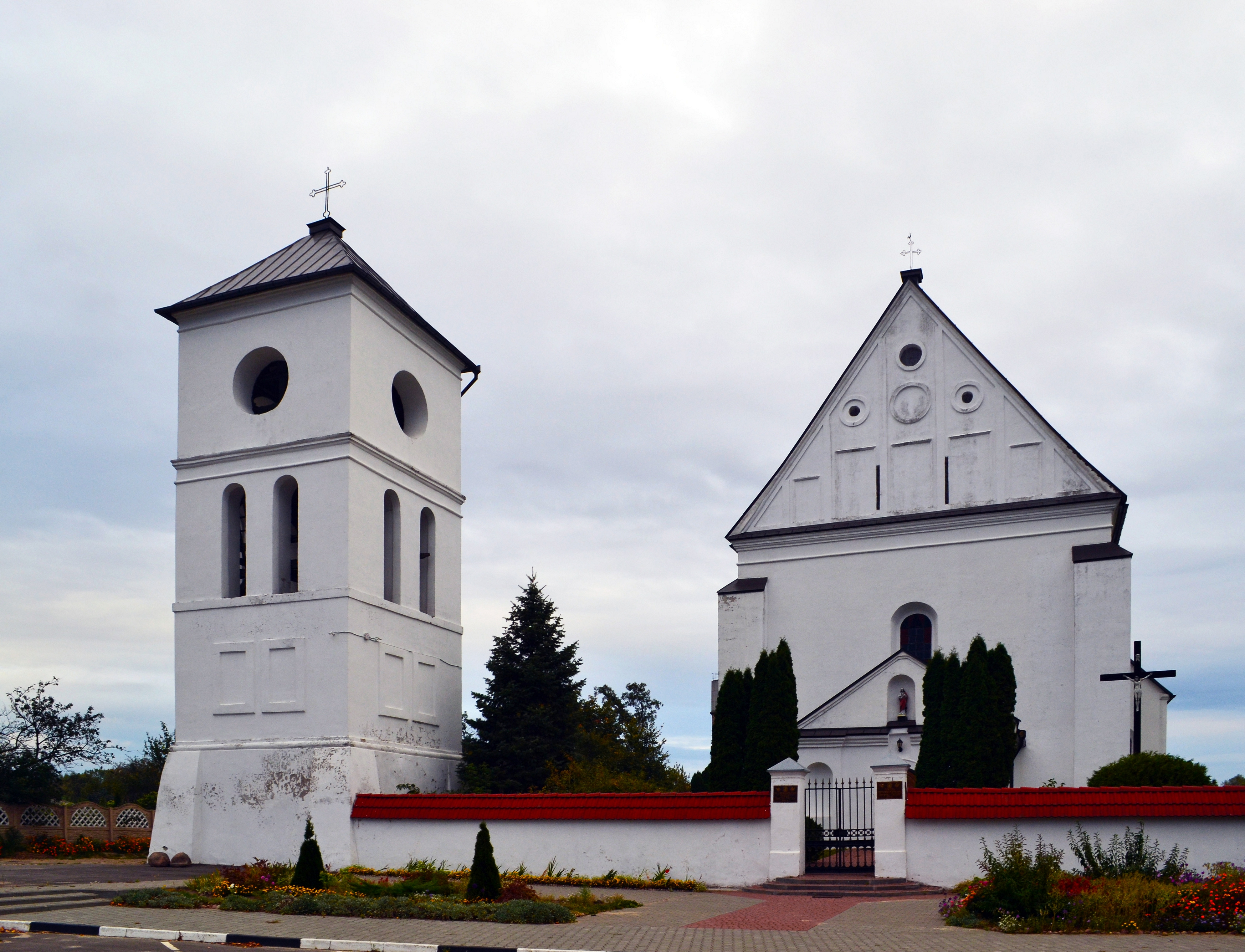 Беларуская (тарашкевіца): Траецкі касьцёл са званіцай, в. Чарнаўчыцы This is a photo of Belarusian heritage monument. Reference number: 112Г000122 ( WLM)